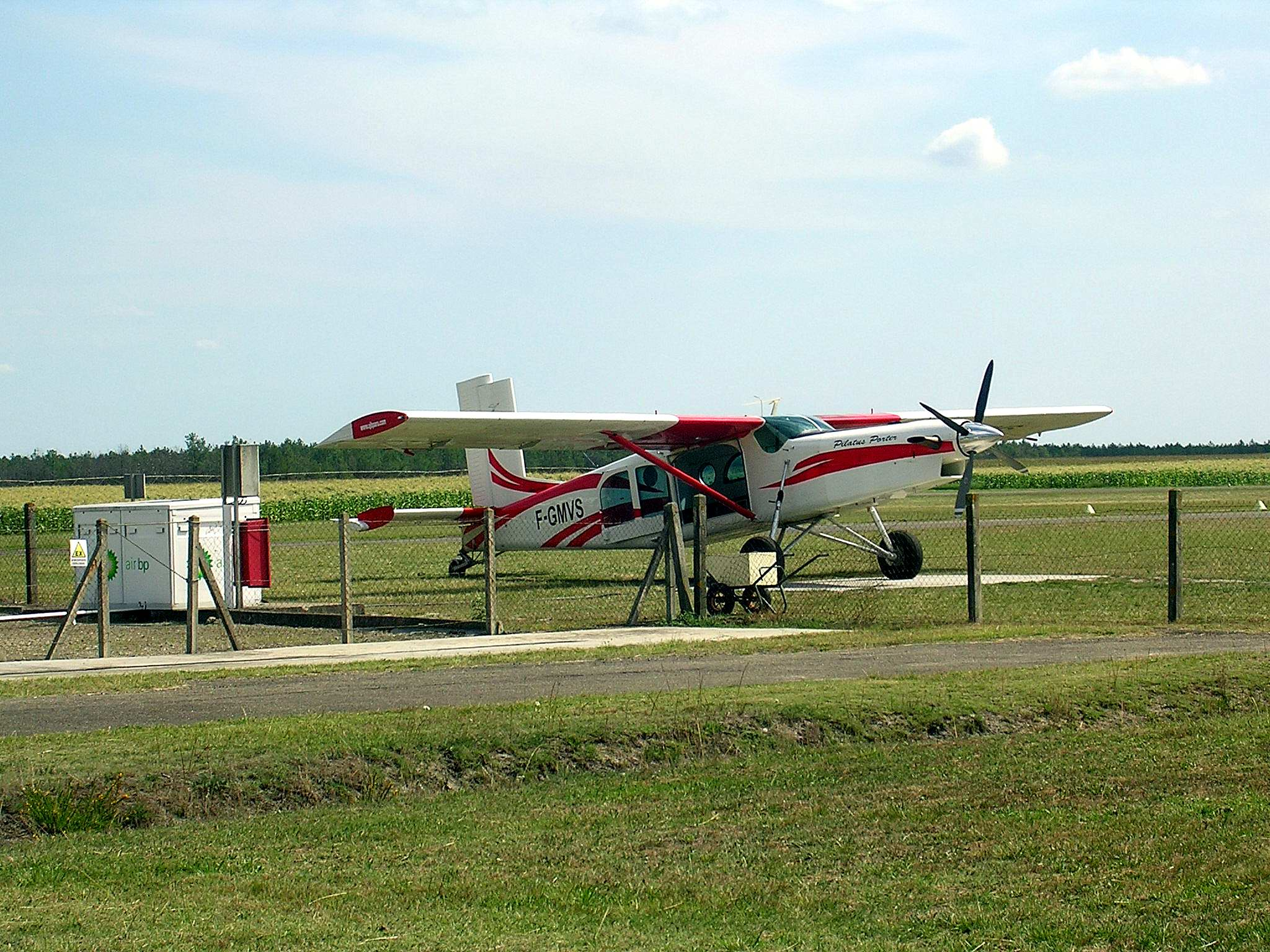 Aérodrome de Mimizan, dans le département français des Landes